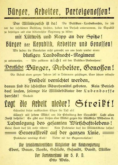 Historisches Flugblatt der SPD vom 13. März 1920 mit dem an „Bürger, Arbeiter, Parteigenossen!“ gerichteten Aufruf des Reichspräsidenten Ebert, der sozialdemokratischen Mitglieder der Reichsregierung und des Parteivorstandes zum Generalstreik gegen den Kapp-Putsch.